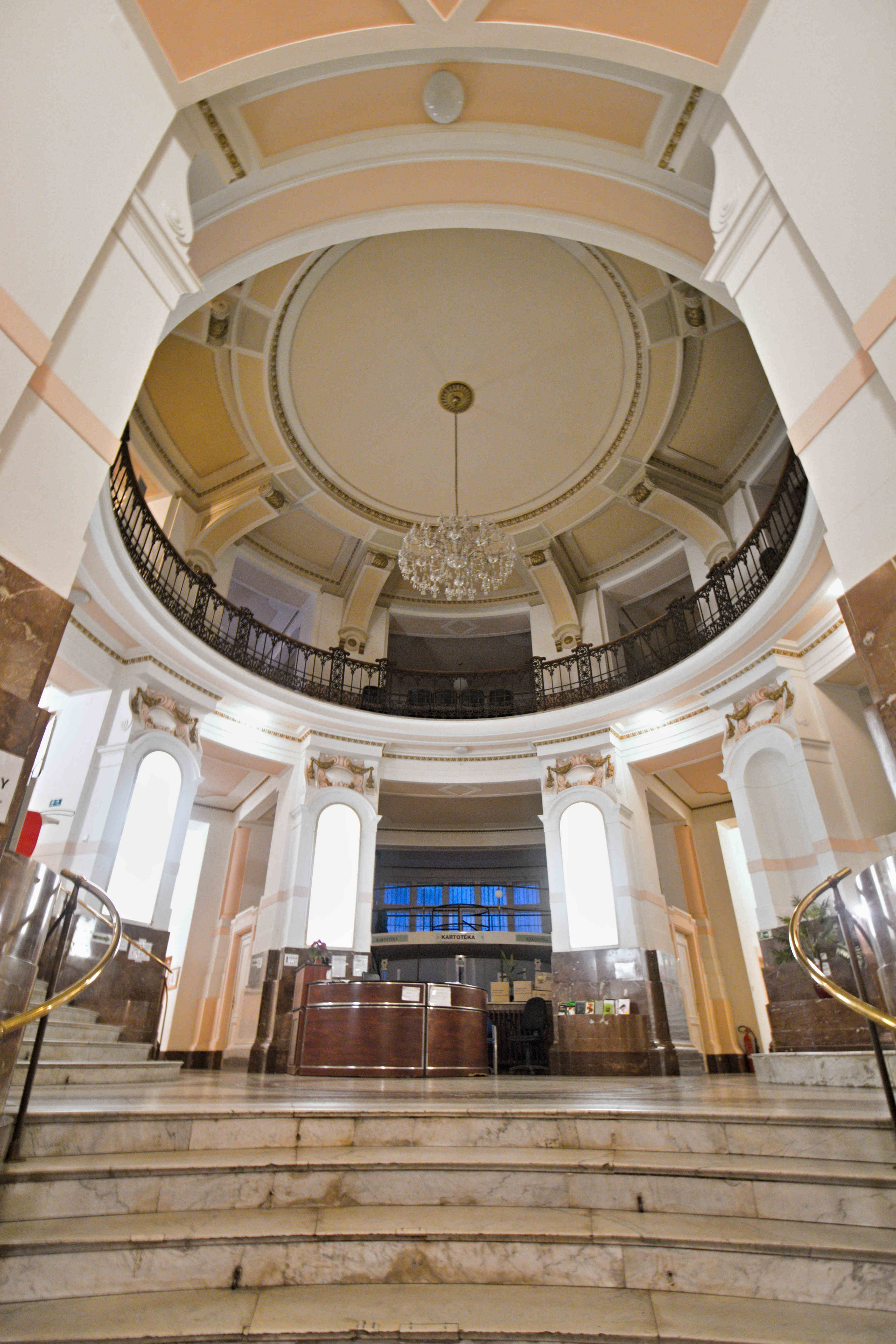 Ústav pro péči o matku a dítě v Praze 4-Podolí